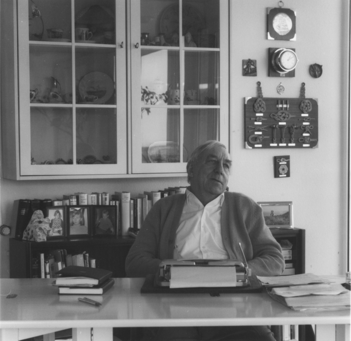 Fotografie von Henry Peter Rickmers (1919–2013) an seinem Schreibtisch auf Helgoland